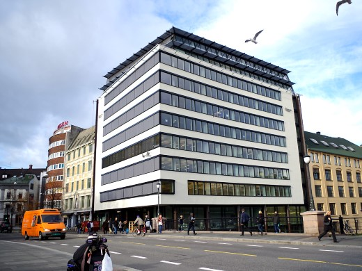 Human-Etisk Forbunds nye hovedkontor i Brugata 19 i Oslo.